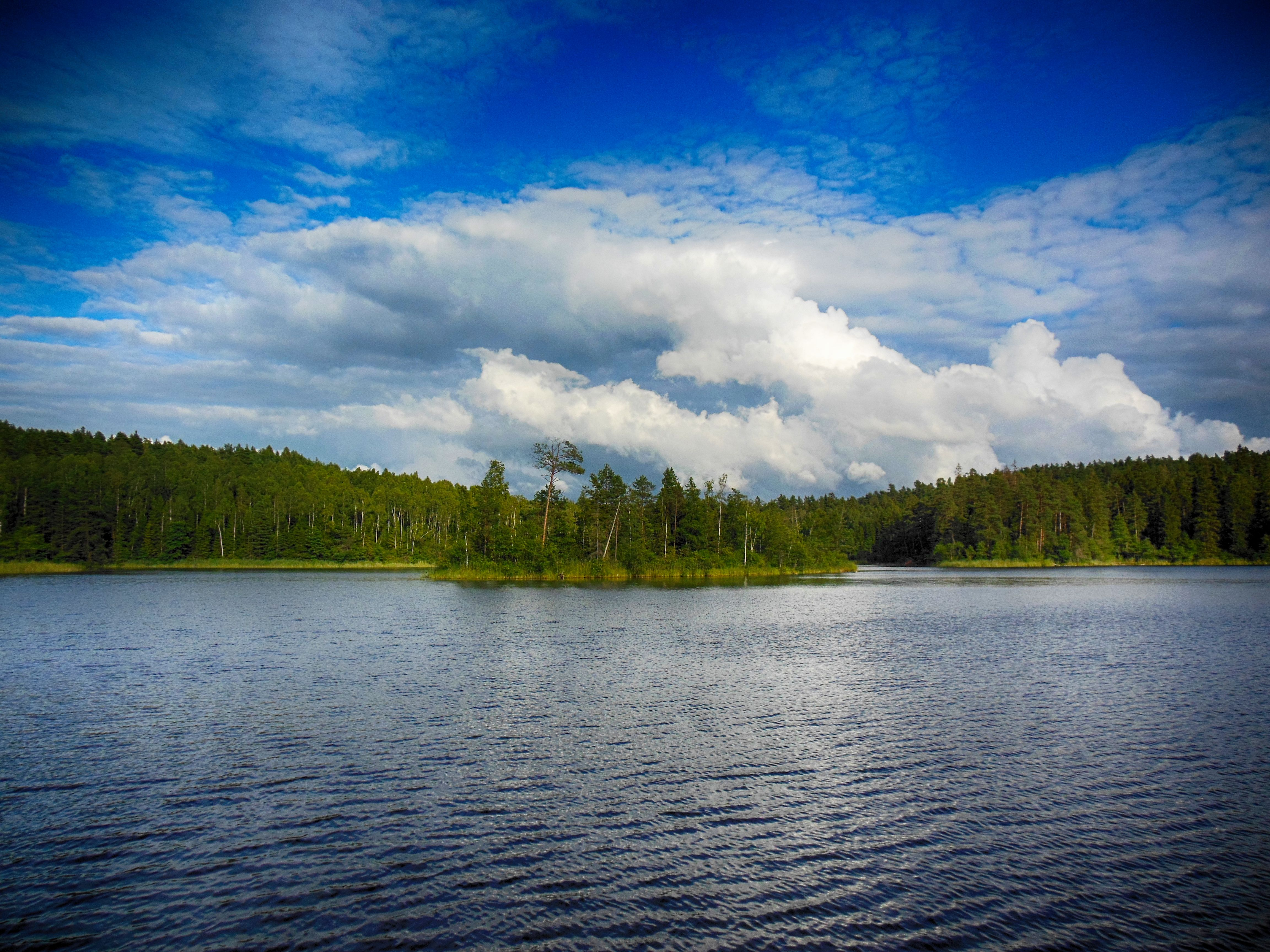 Беларуская (тарашкевіца): Блакітныя вазёры - Глубелька